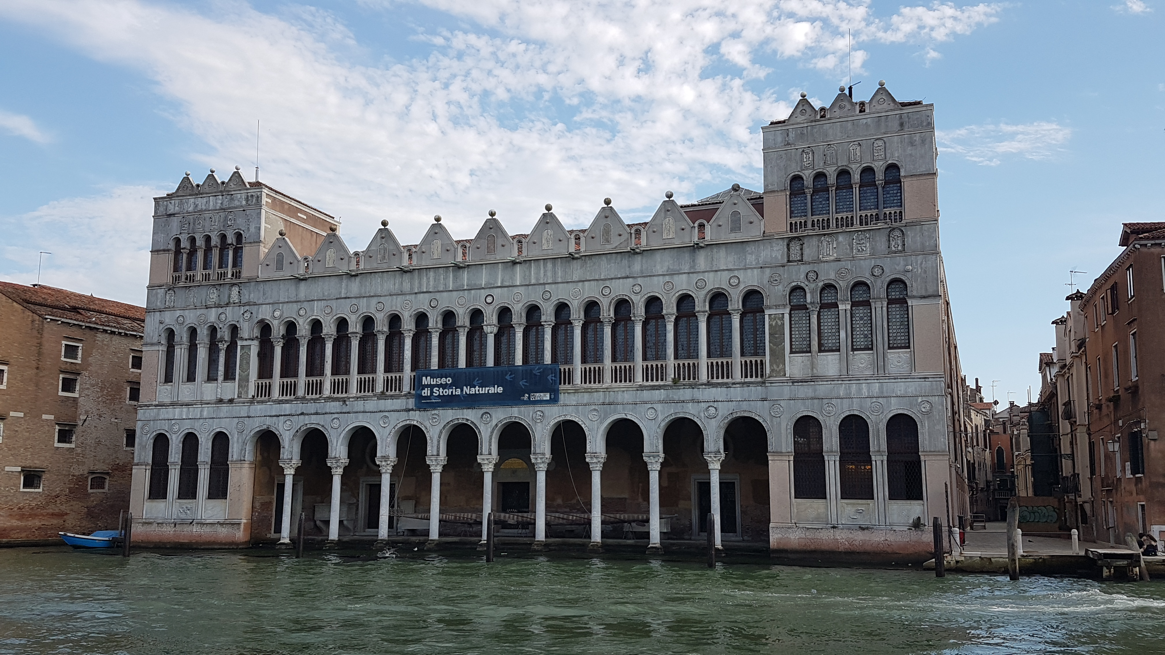 Venedig-San Polo, Fondaco dei Turchi (Naturhistorisches Museum)